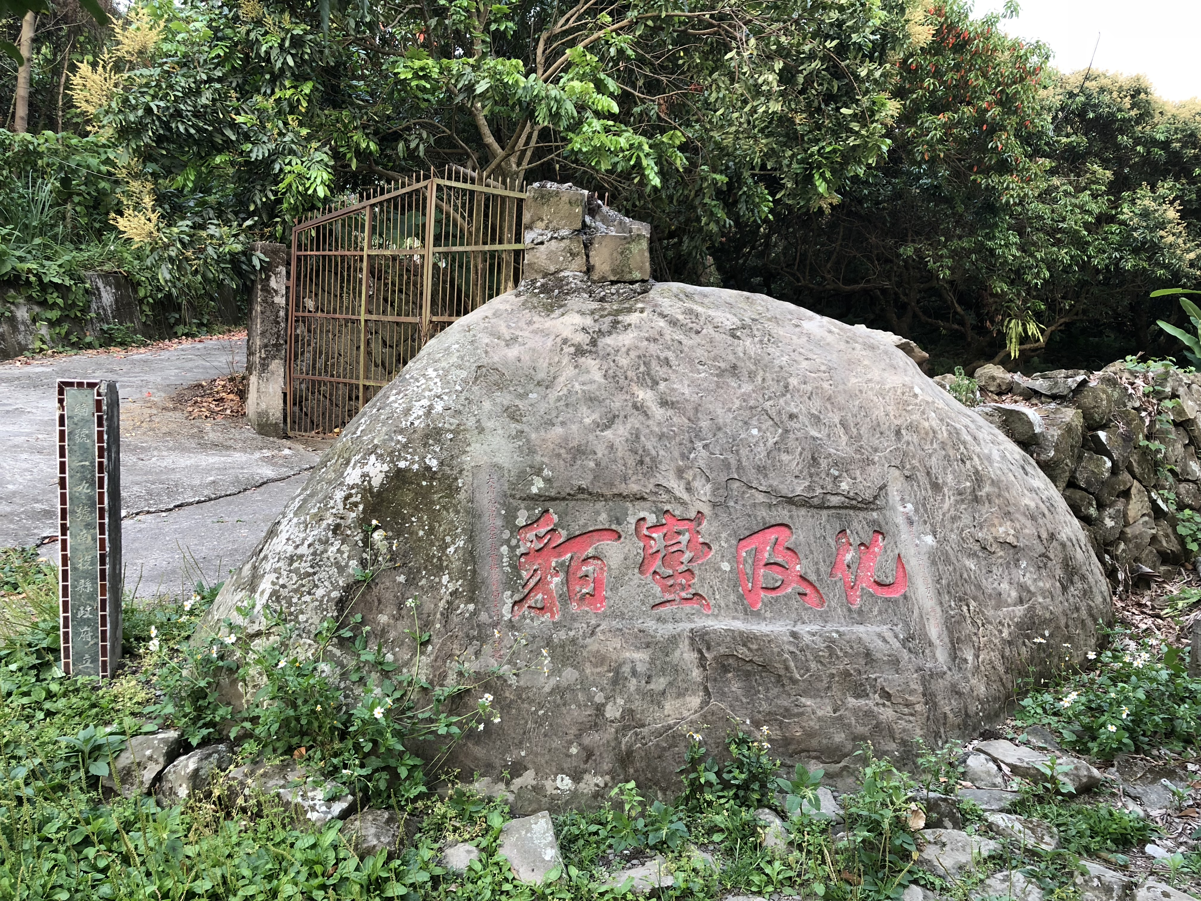 國家一級古蹟集集鎮化及蠻貊(遠照)